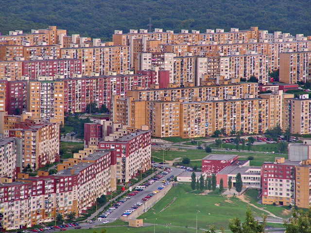 from Hradova